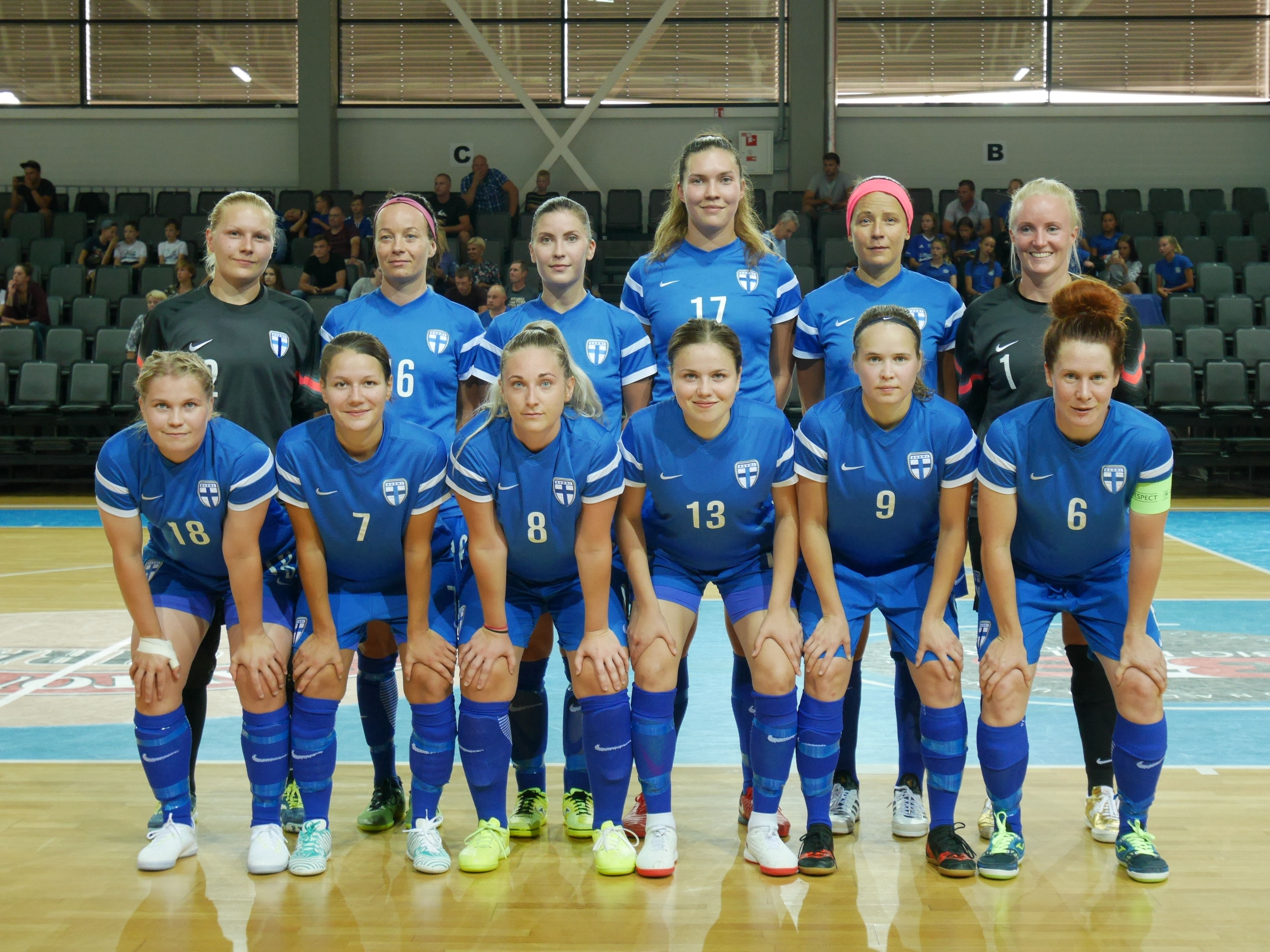 Suomen naisten futsalmaajoukkue EM-esikarsintaturnauksessa Prienaissa Liettuassa elokuussa 2018